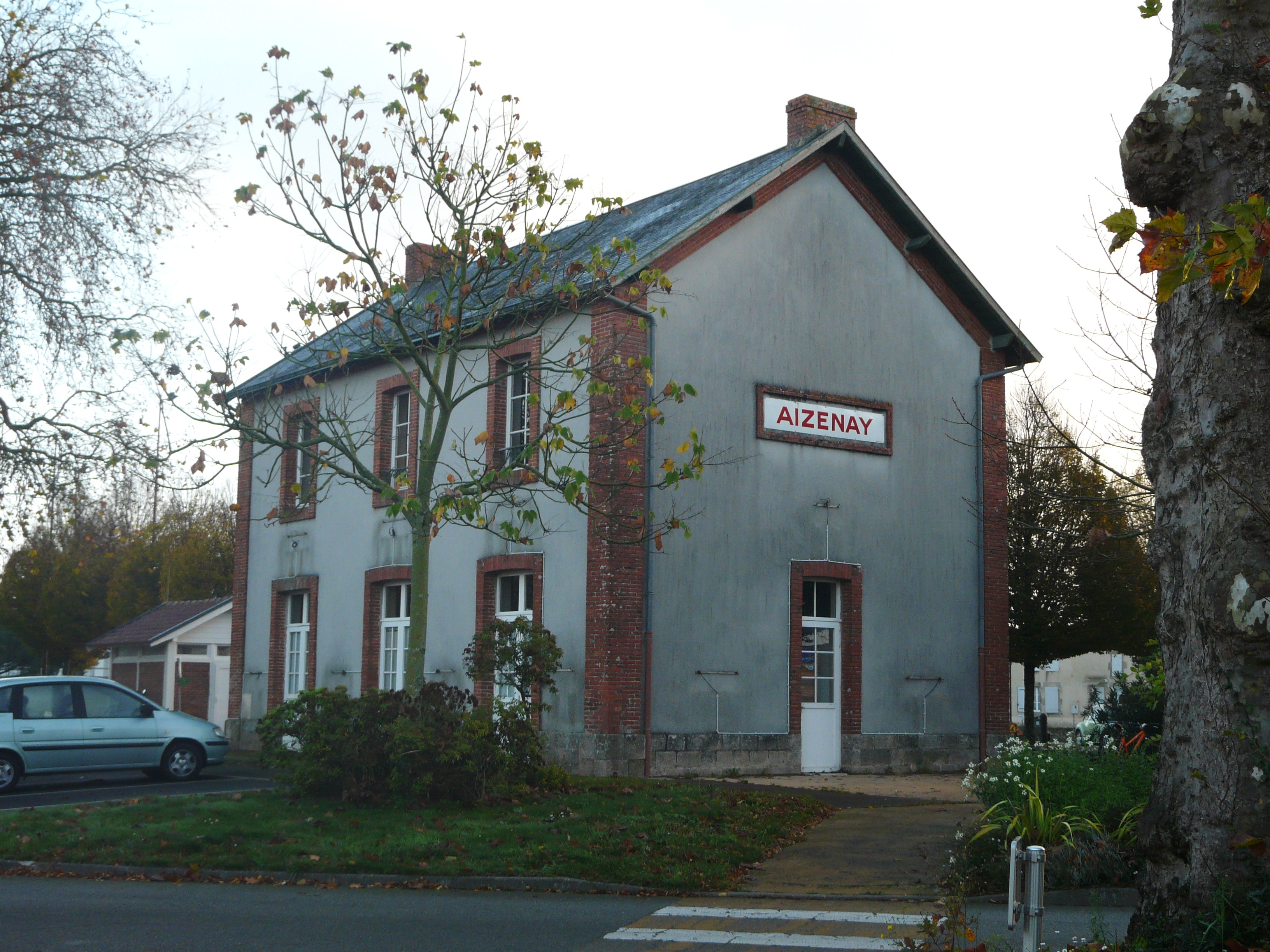 Le bâtiment voyageurs de l'ancienne gare d'Aizenay, Vendée, France.